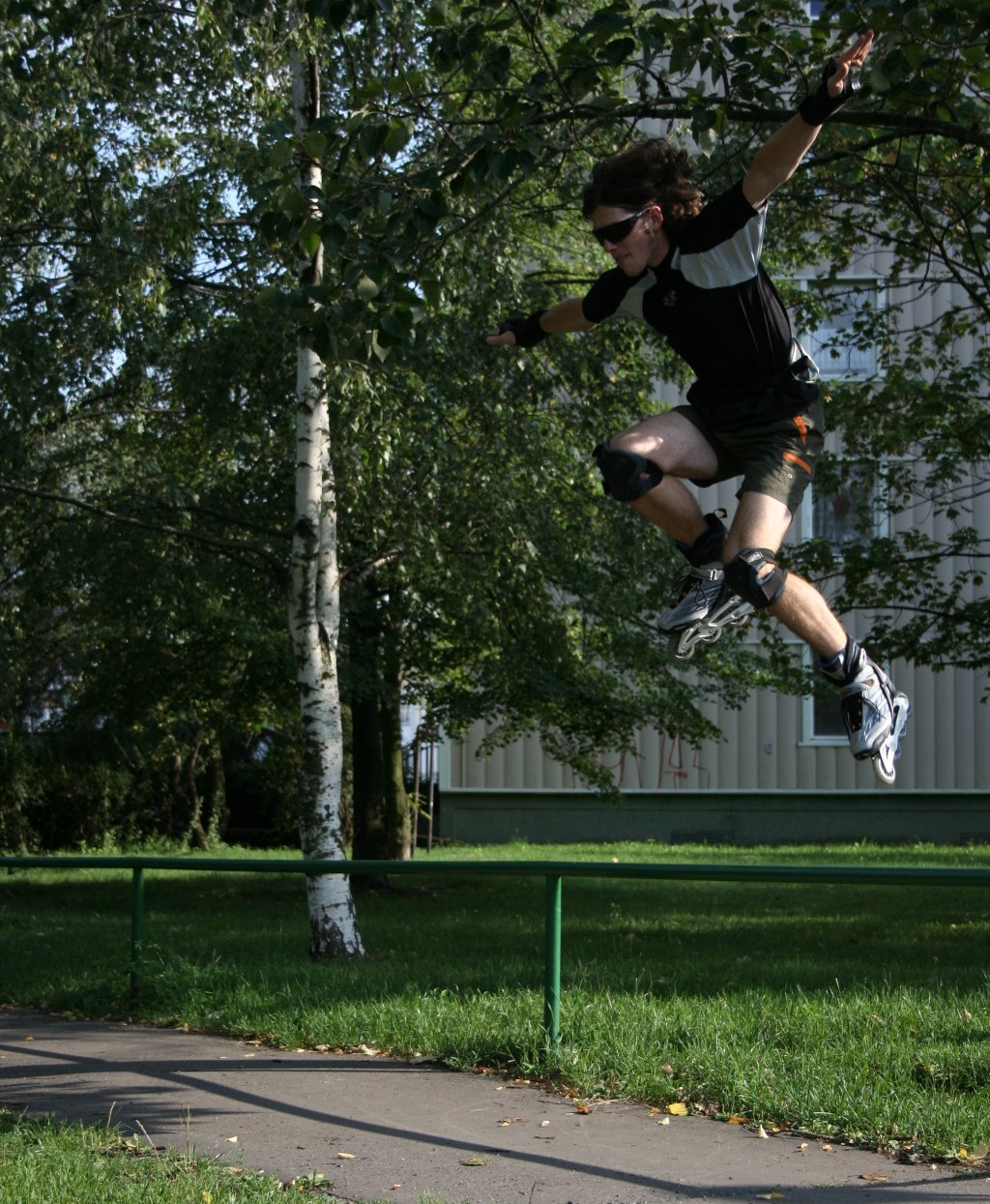 inline freestyler jump